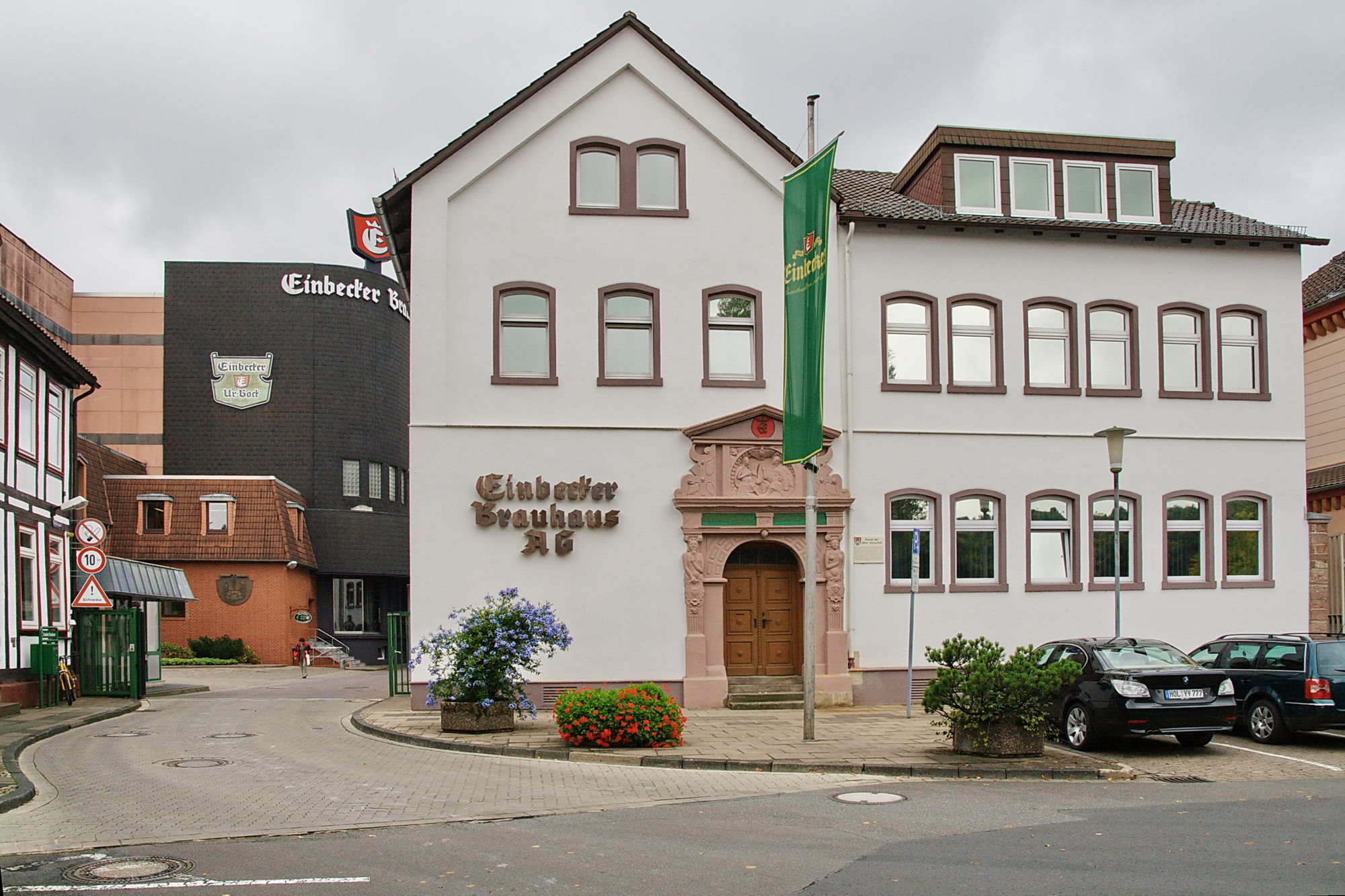 Einbecker Brauhaus AG in Einbeck, Niedersachsen, Deutschland